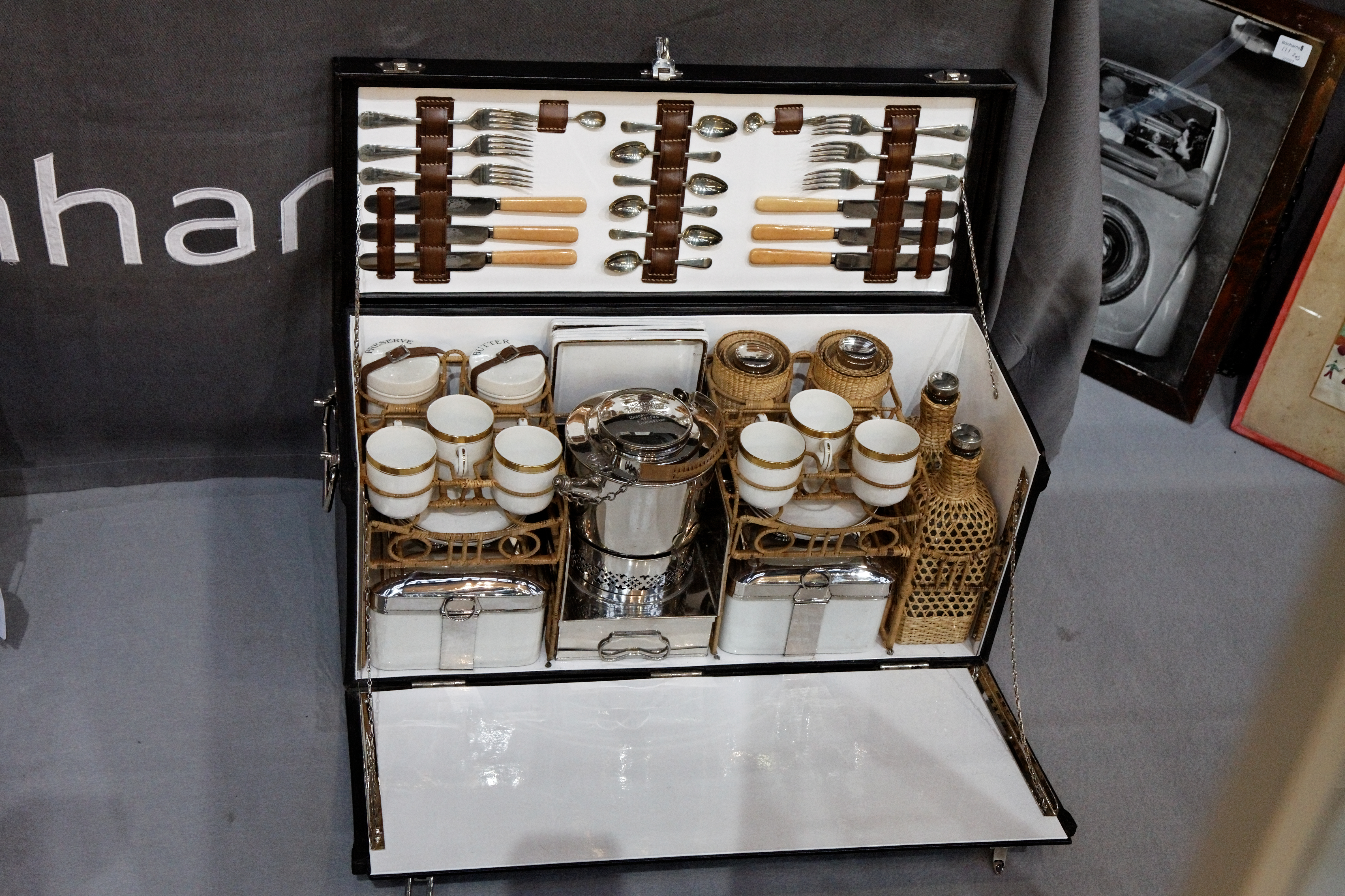 Panier à pique-nique ancien pour six personnes par G W Scott & Sons